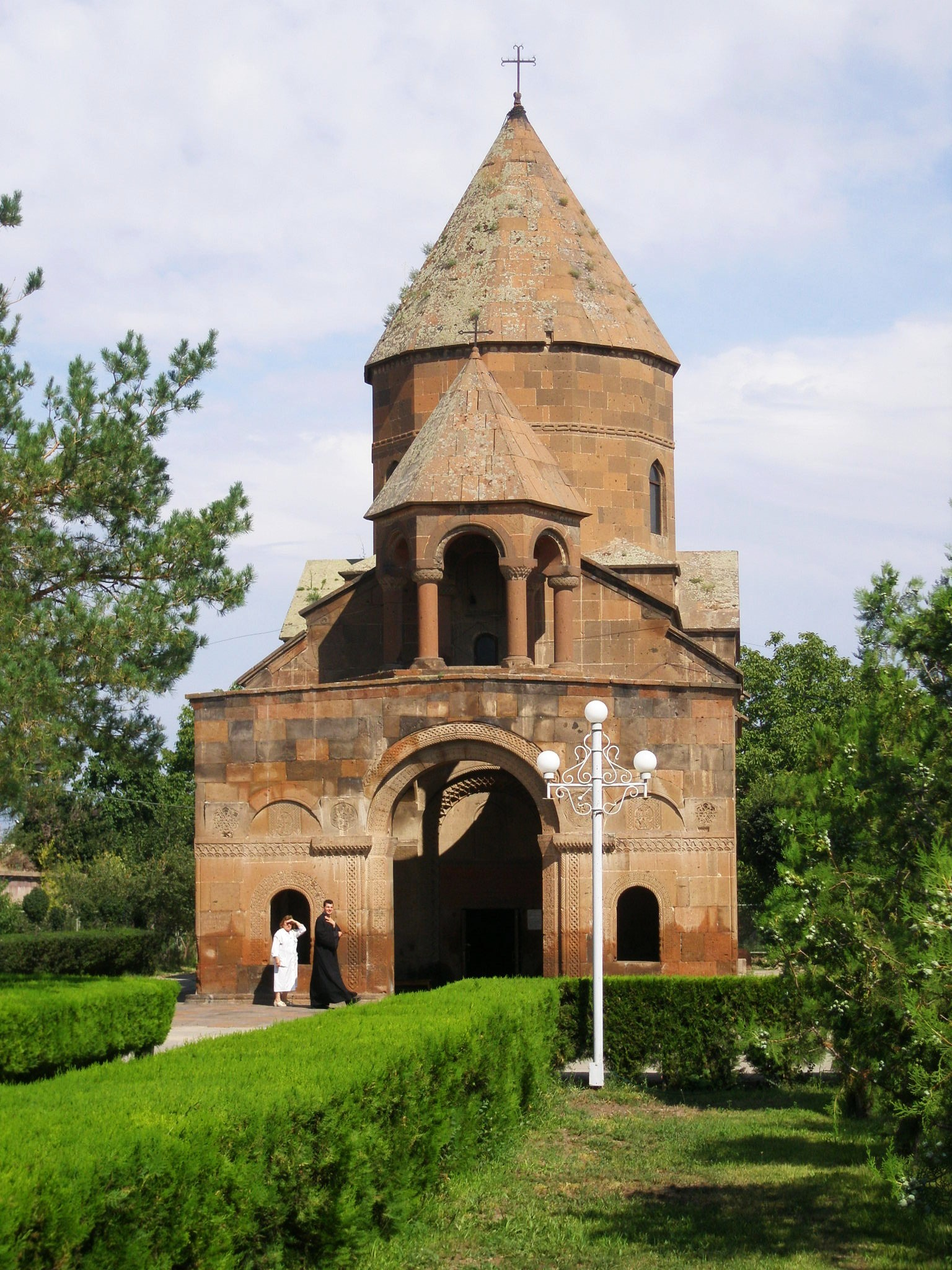 Shoghakat Church